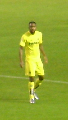 Bakambu.